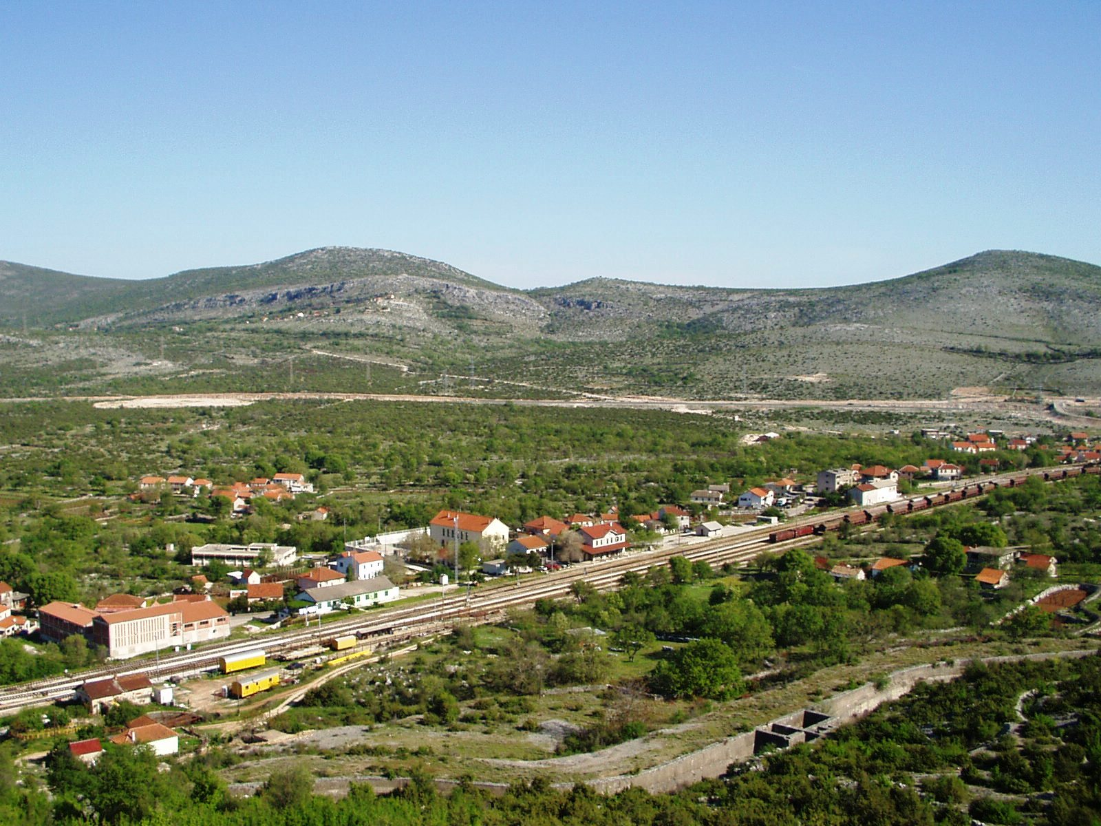 Željeznička stanica Perković